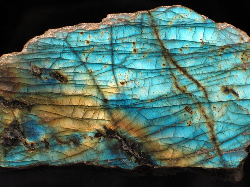 labradoryt, pochodzenie Madagaskar, autor zdjęcia Stowarzyszenie Spirifer